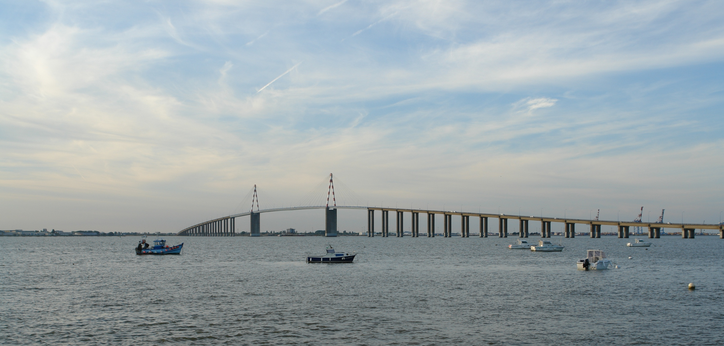 Pont de Saint-Nazaire depuis St-Brévin.